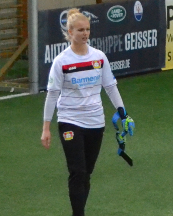 Anna Klink (Bayer Leverkusen) beim SAP Frauen-FußballCup 2017